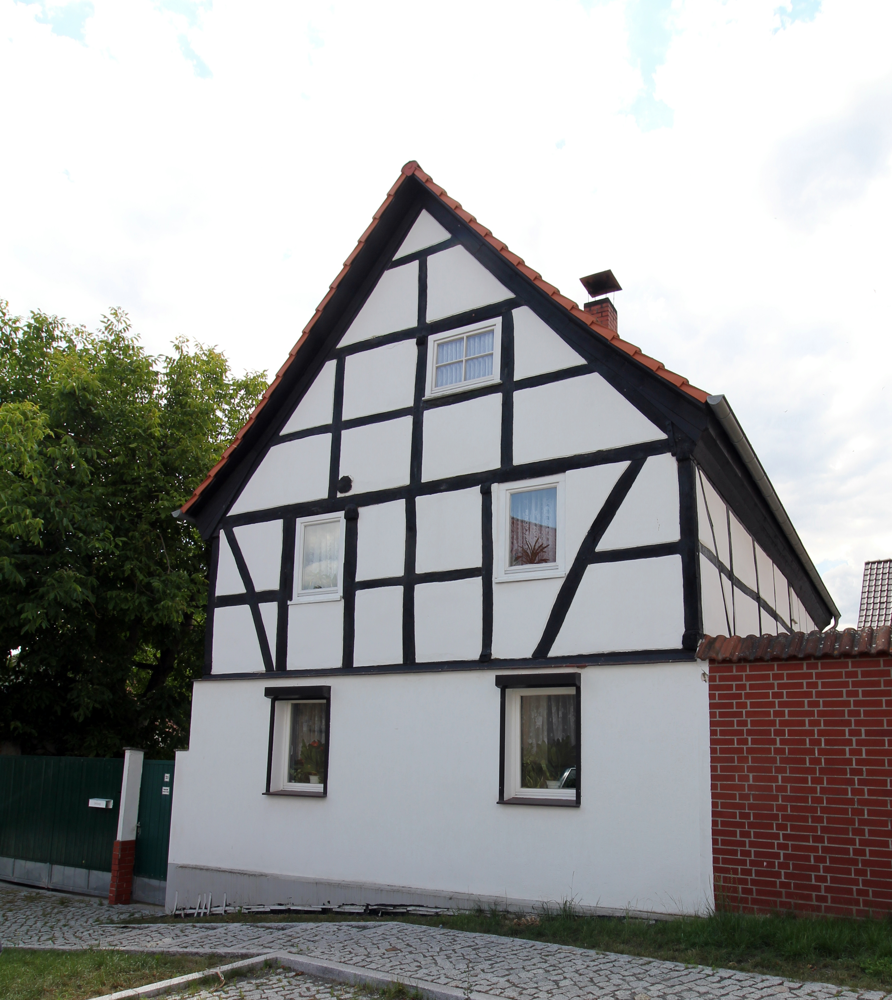 Wohnhaus Walter-Rathenau-Straße 21 in Niederndodeleben